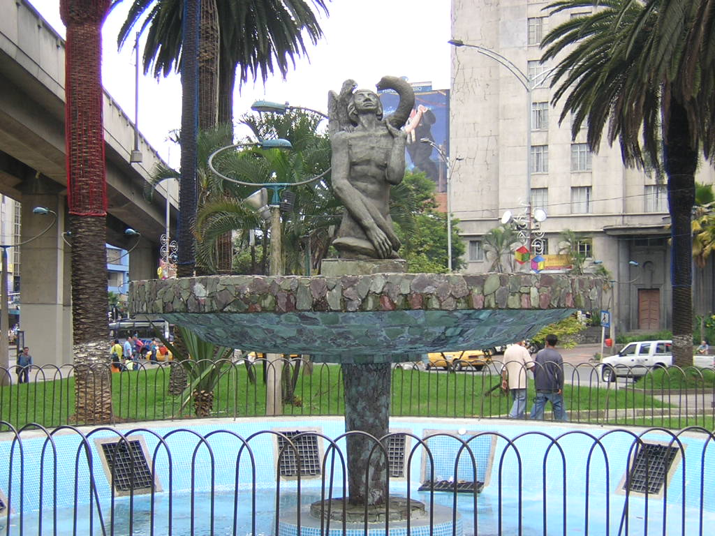 Fuente Cacique Nutibara de Pedro Nel Gomez, ubicado en la Plazuela Nutibara. Medellín, Colombia